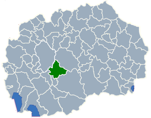 Map of Opština Dolneni (Долнени)